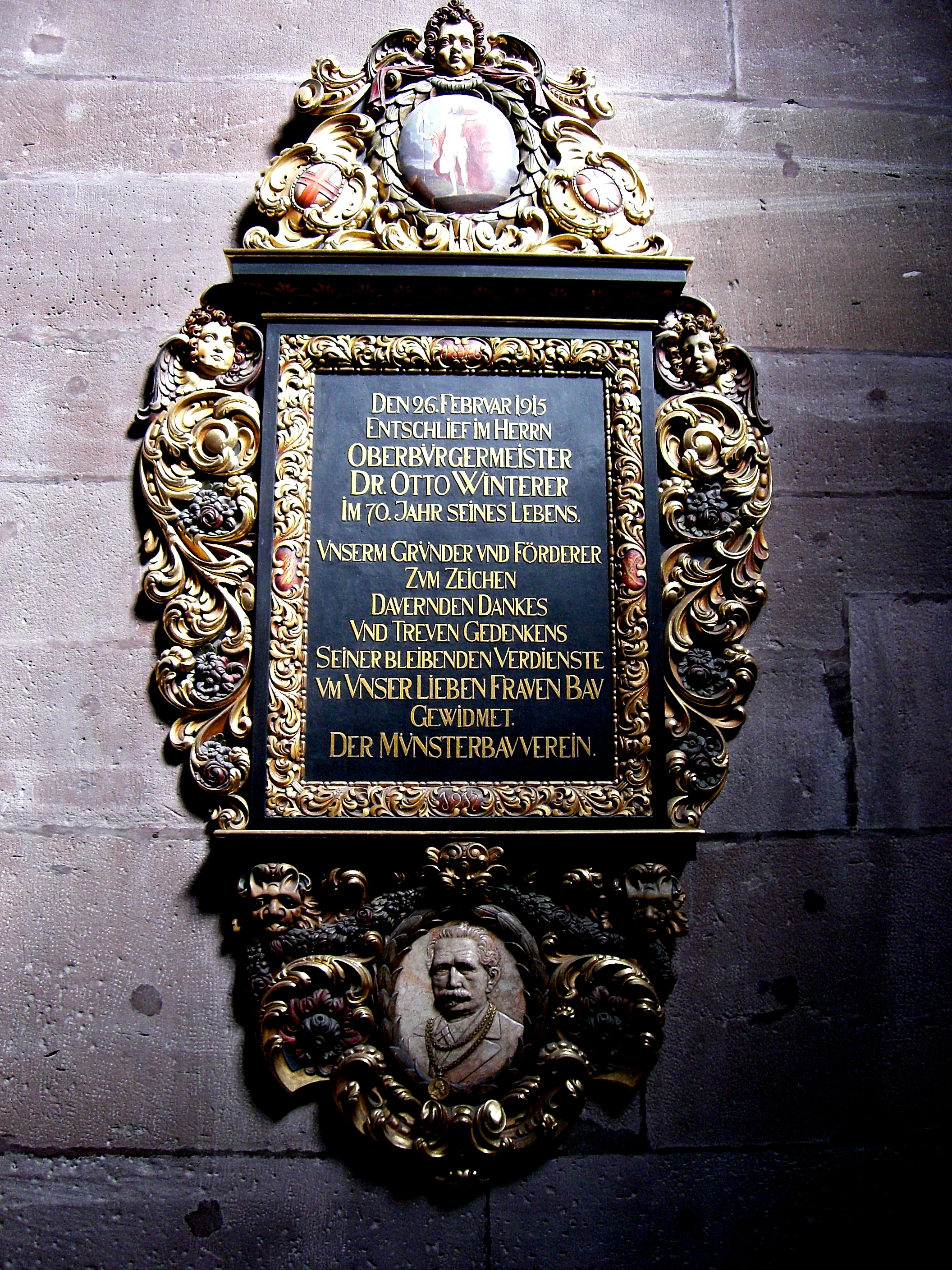 Gedektafel für Dr. Otto Winterer (Oberbürgermeister Freiburg 1888–1913) des Münsterbauvereins im Freiburger Münster. Inschrift: DEN 26. FEBRVAR 1915 ENTSCHLIEF IM HERRN OBERBÜRGERMEISTER DR. OTTO WINTERER IM 70. JAHR SEINES LEBENS. VNSERM GÜNDER VND FÖRDERER ZVM ZEICHEN DAVERNDEN DANKES VND TREVEN GEDENKENS SEINER BLEIBENDEN VERDIENSTE VM VNSERER LIEBEN FRAVEN BAV GEWIDMET. DER MÜNSTERBAVVEREIN.